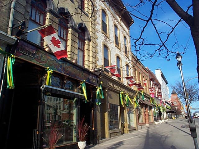 Ontario Street in Stratford / Kanada